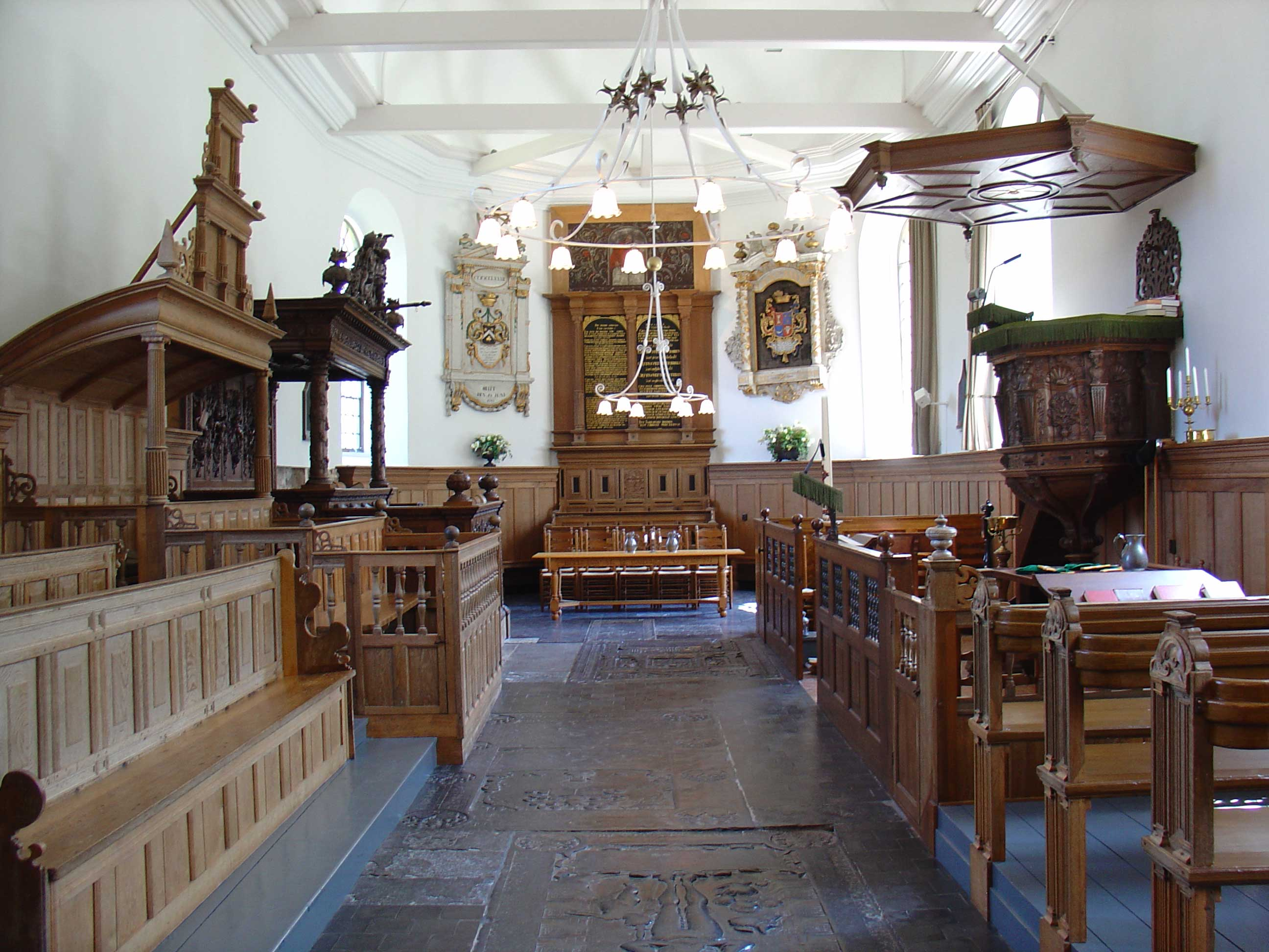 Interieur van de Pauluskerk van Oudkerk/Aldtsjerk